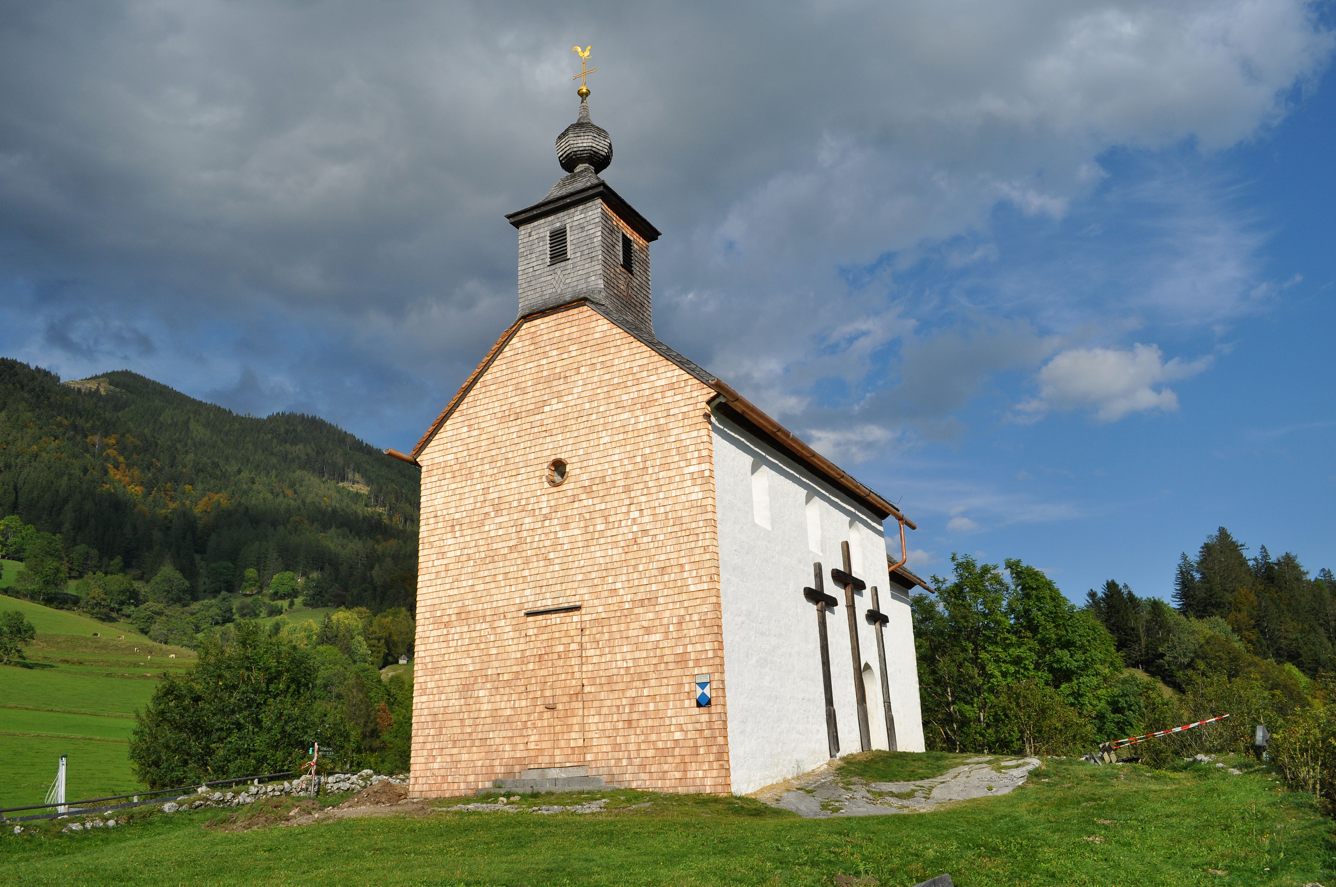 St. Johannes-Kapelle mit ehem. Kirchhof und Mauerresten, Pürgg